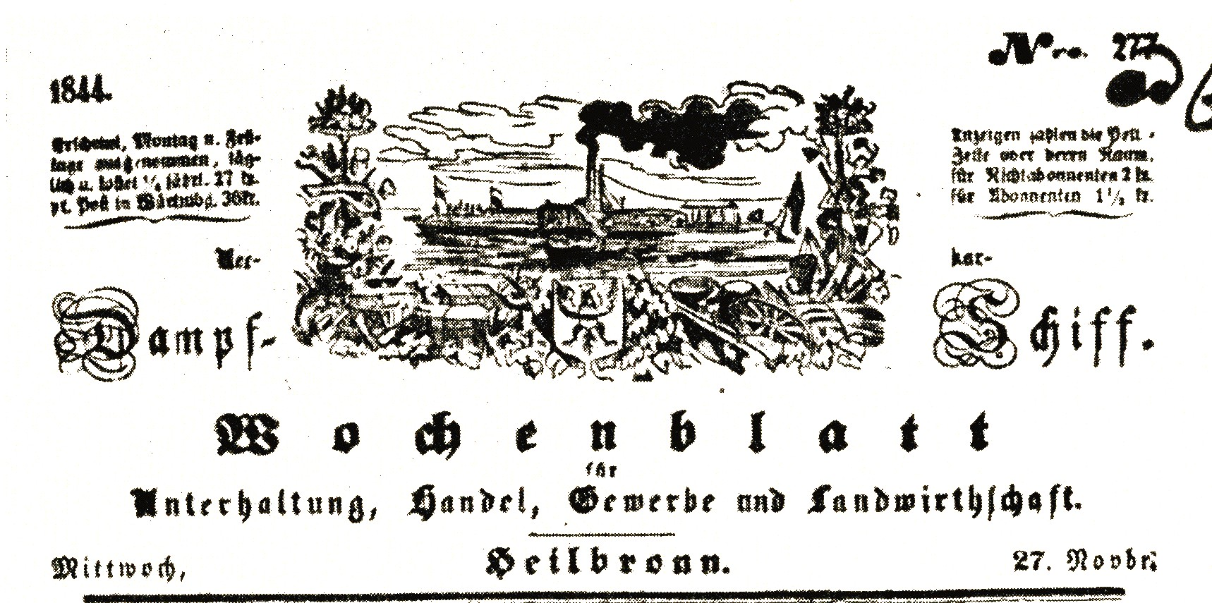 Titelkopf der Heilbronner Zeitung Neckar-Dampf-Schiff